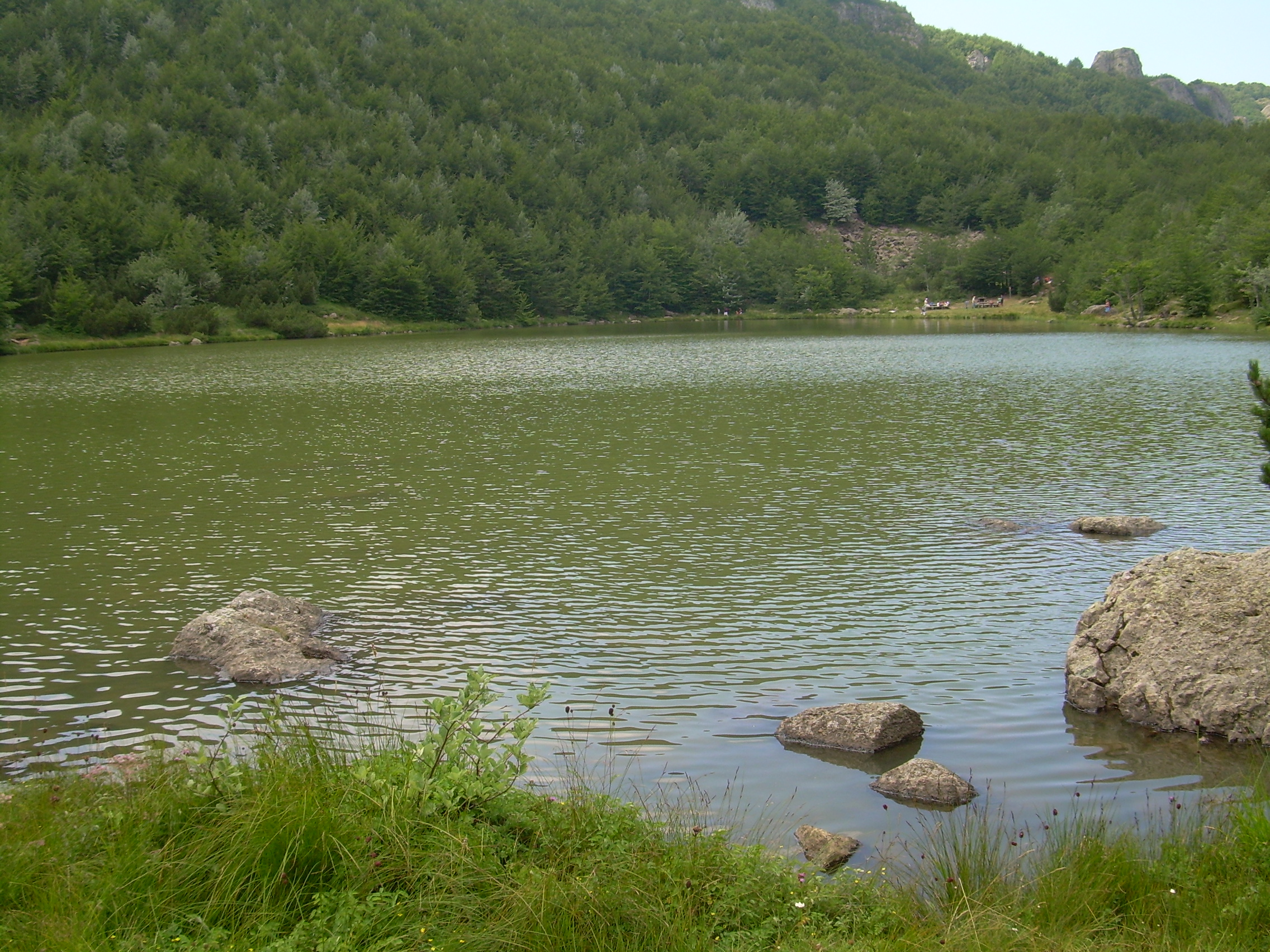 Il Lago Nero è un bellissimo lago nell'Appennino Ligure, in provincia di Piacenza.